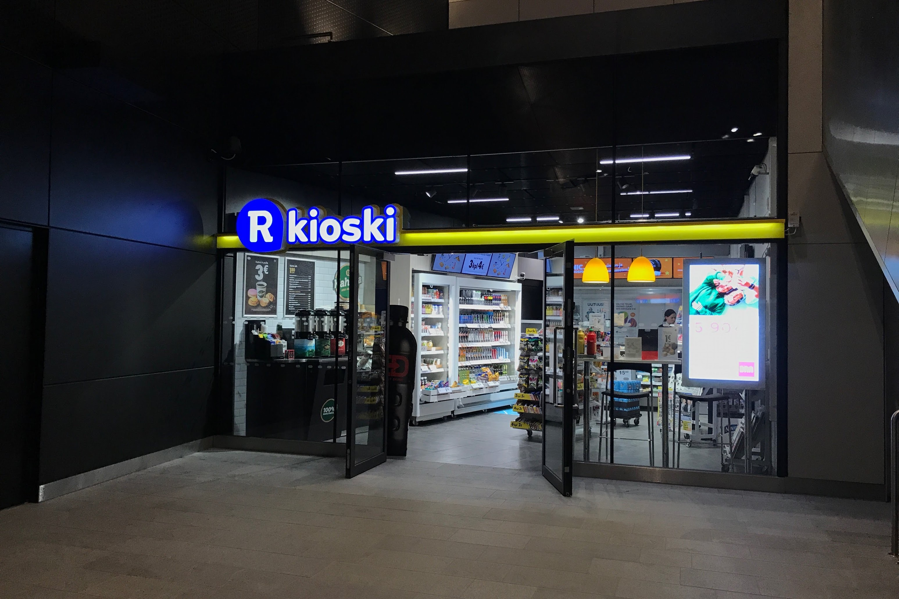 アールト大学駅内にあるR-kioski